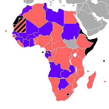 Pays qualifiés à la Coupe d'Afrique des Nations 2012